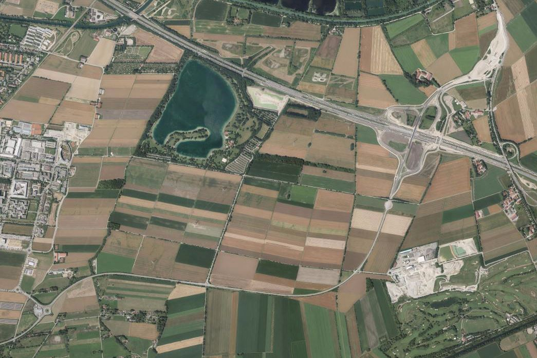 Luftbild der Kreisstraße M 3 auf dem Gemeindegebiet von Unterföhring bei München, Oberbayern. In der oberen rechten Bildhälfte Anschlussstelle Aschheim/Ismaning der Bundesautobahn 99 in der Bauphase. In der Bildmitte das Naherholungsgebiet Feringasee.